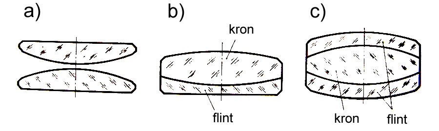 Rodzaje lup